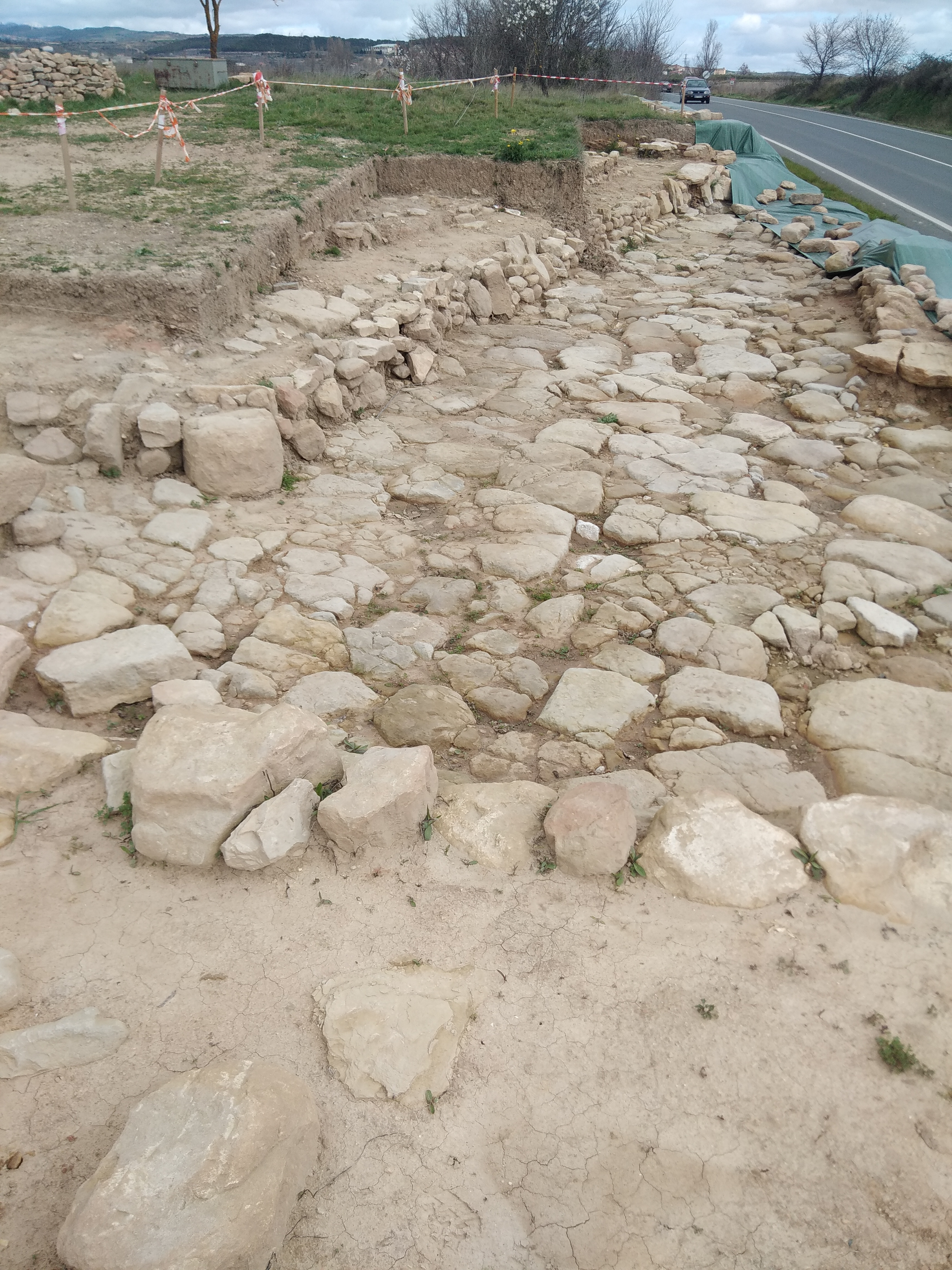 Yacimiento arqueológico de La Custodia, Viana, Navarra, España